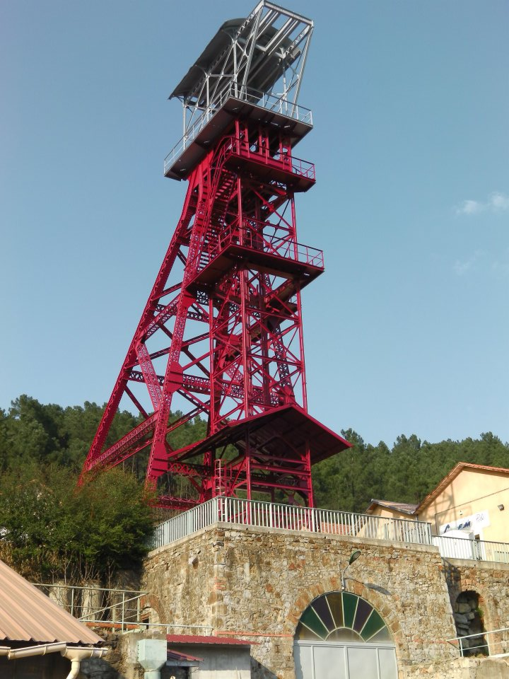 Chevalement du Puits Fontanès sur el site de l'ancienne mine de Ladrecht à Saint-Martin de Valgalgues (Gard)